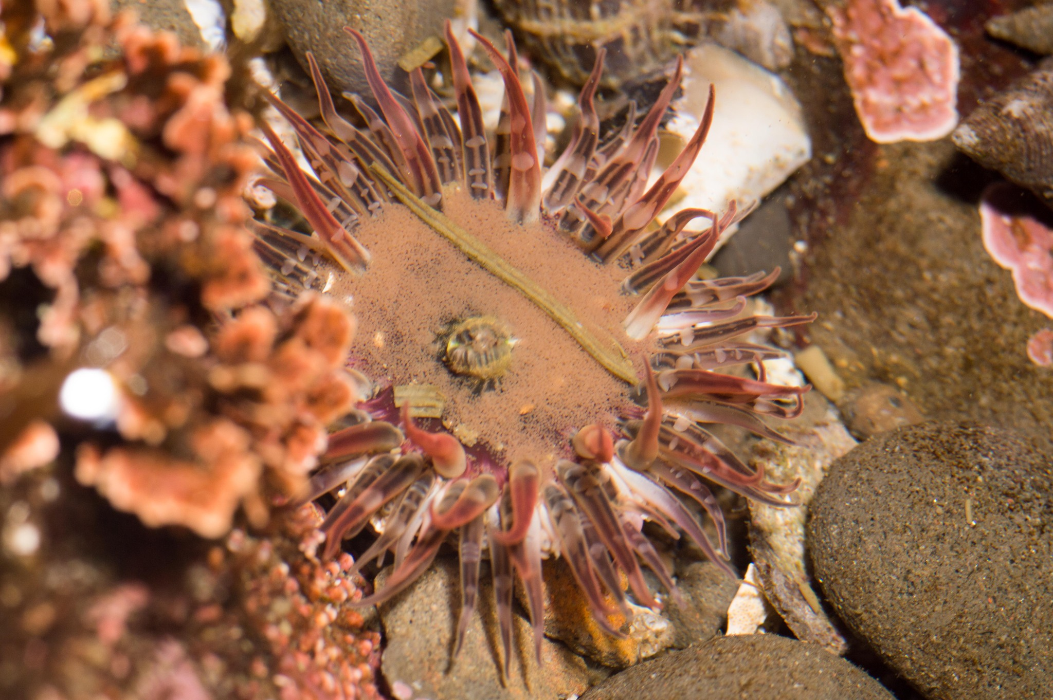 Anthopleura artemisia en Pillar Point, California, EE.UU.